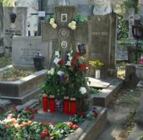 Mormîntul Mariei Tănase la aniversarea a 100 de ani de la ziua de naştere. Contribuţie de Primarul Sectorului 4, Bucureşti, Cristian Popescu Piedone.